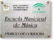 Placa de entrada a la Escuela Municipal de Música de Priego de Córdoba